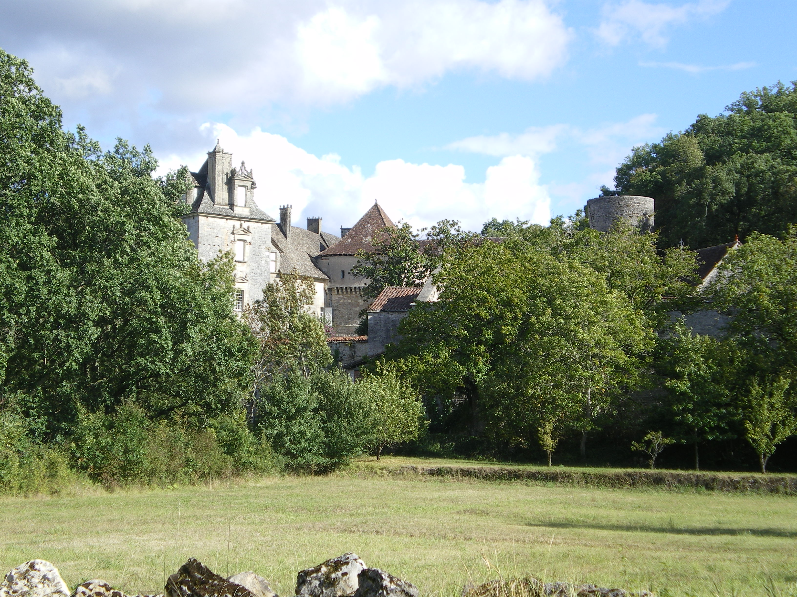 Château de Cénevières, Lot, France